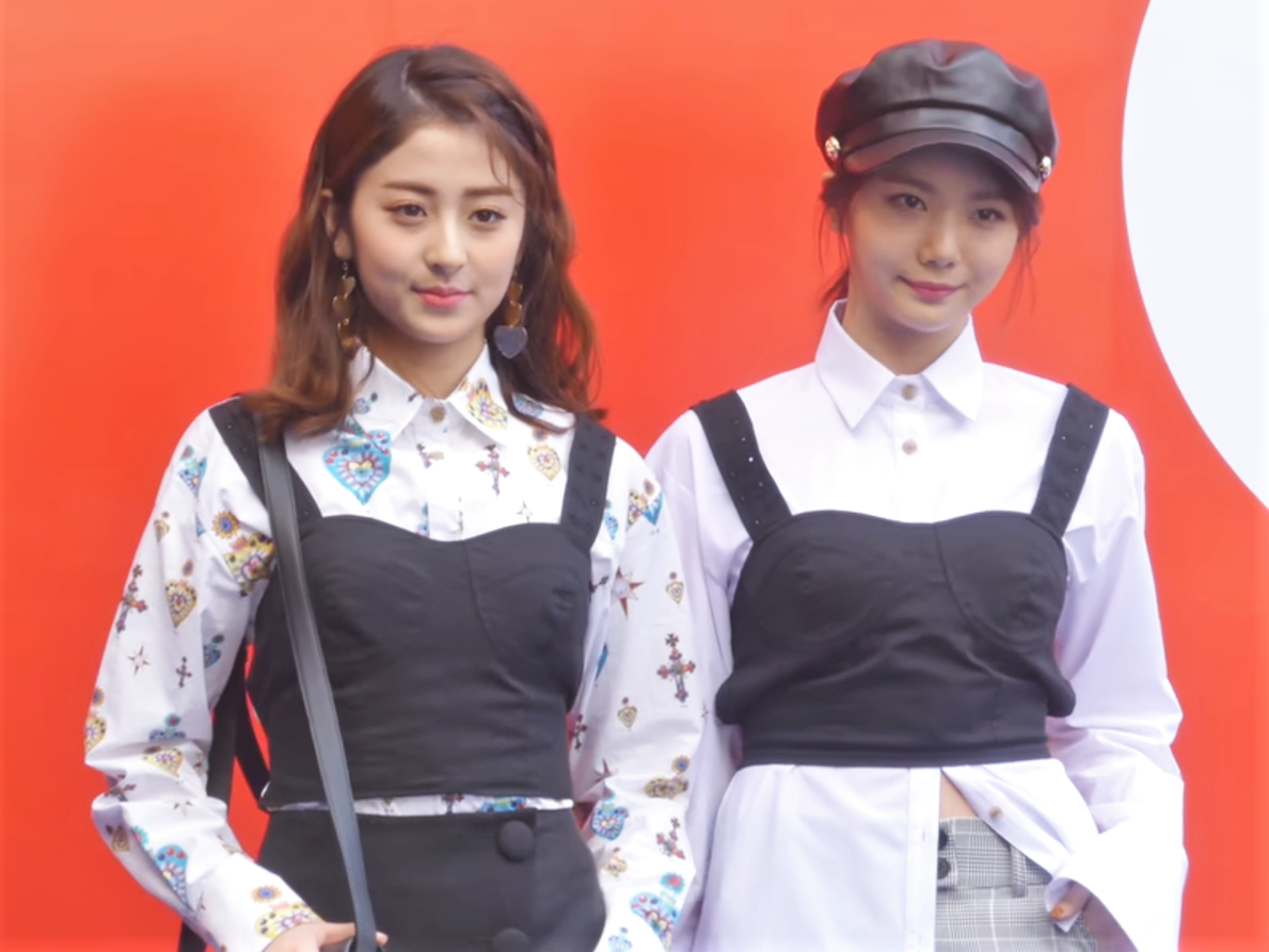 181018 '2019 S:S 헤라서울패션위크' 빅팍 컬렉션